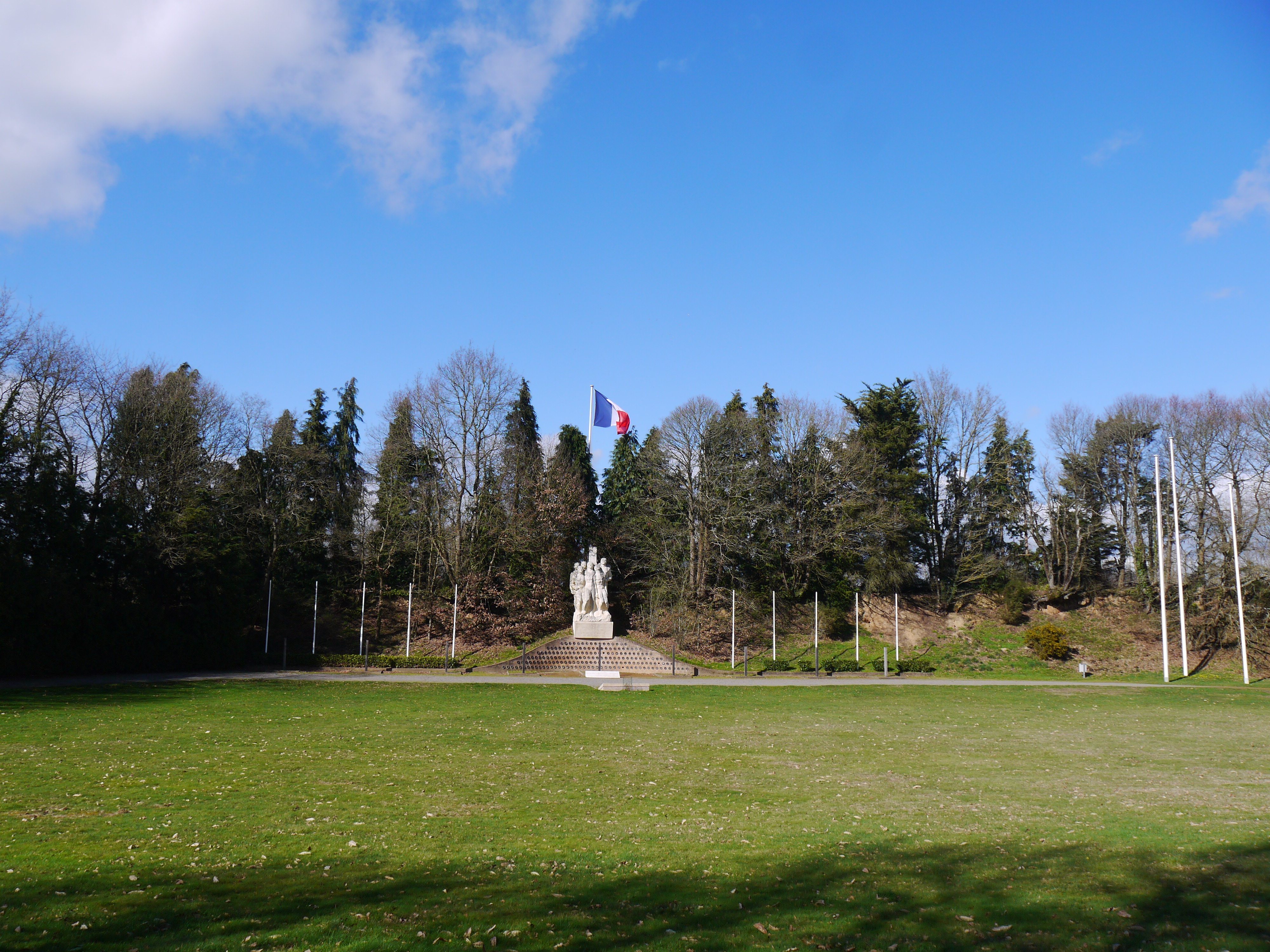 Vue d'ensemble du site.